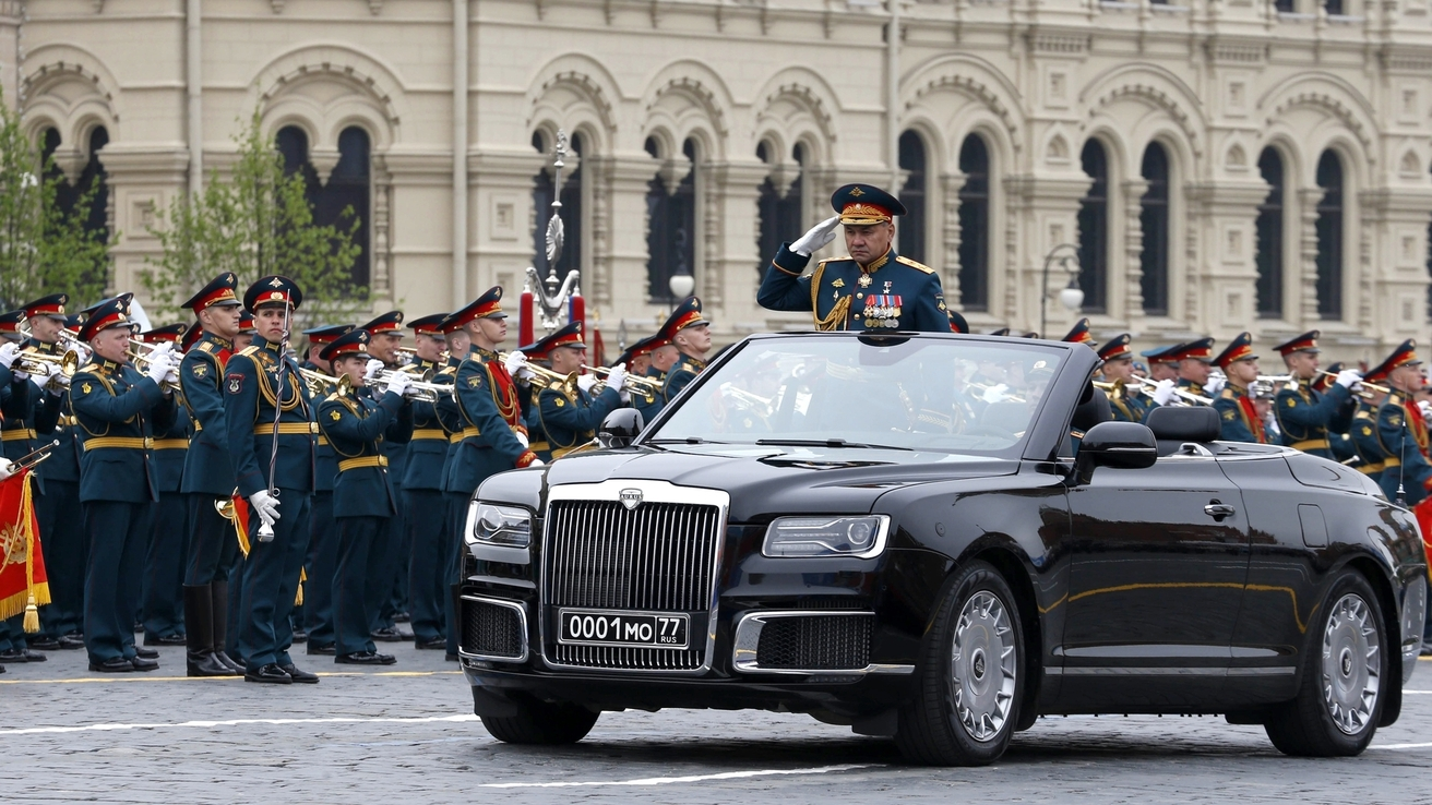 Дмитрий Медведев и члены Правительства присутствовали на военном параде в честь 74–й годовщины Победы